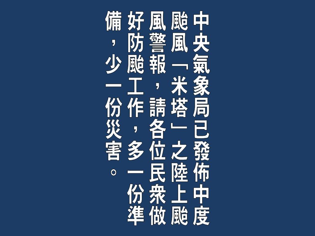 模擬台視版政令宣導字卡，此範例為模擬防颱宣導。此張圖為第三版，為更改背景顏色。颱風名稱「米塔」為虛構內容